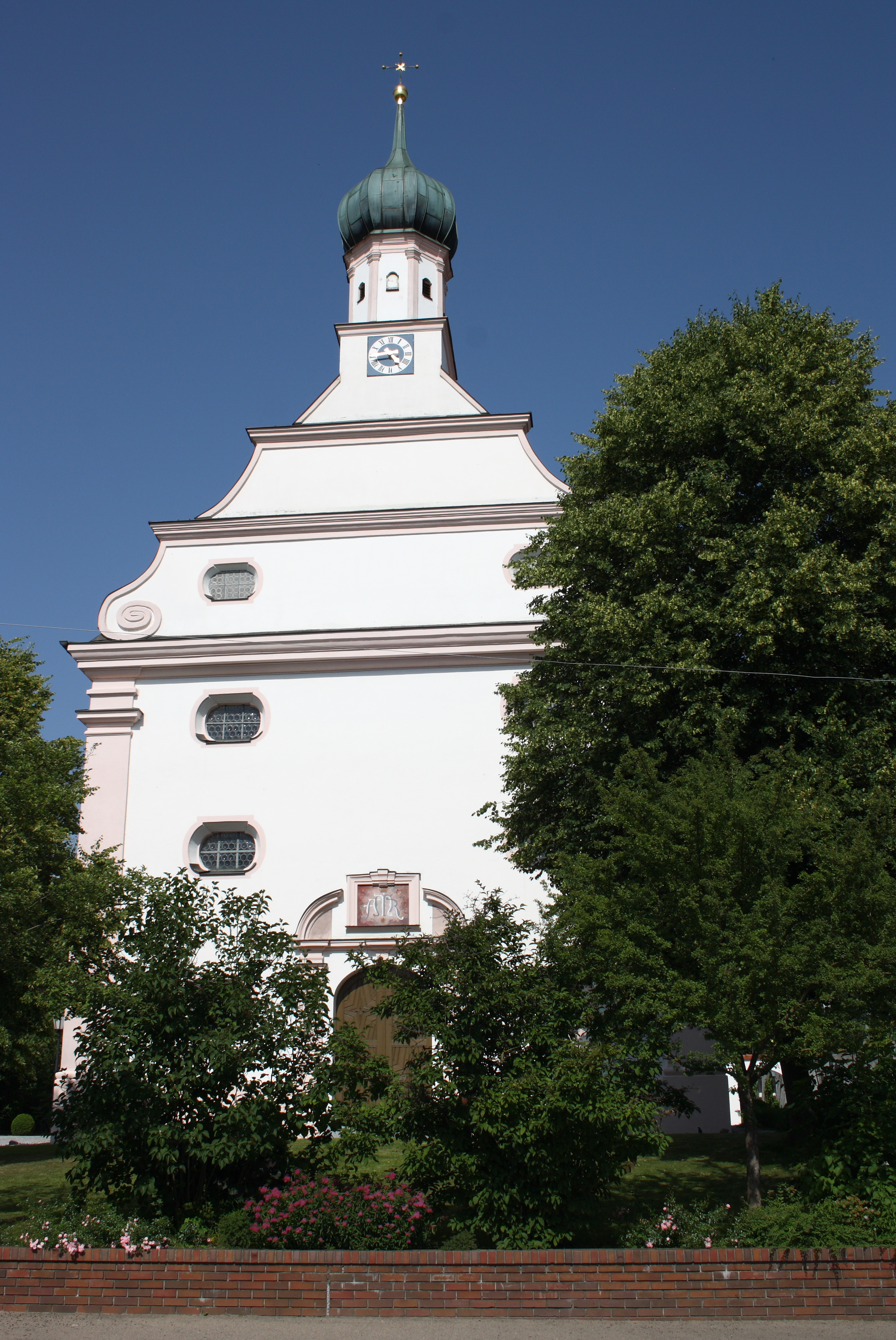 Katholische Wallfahrtskirche Unsere Liebe Frau in Münsterhausen im Landkreis Günzburg (Bayern)